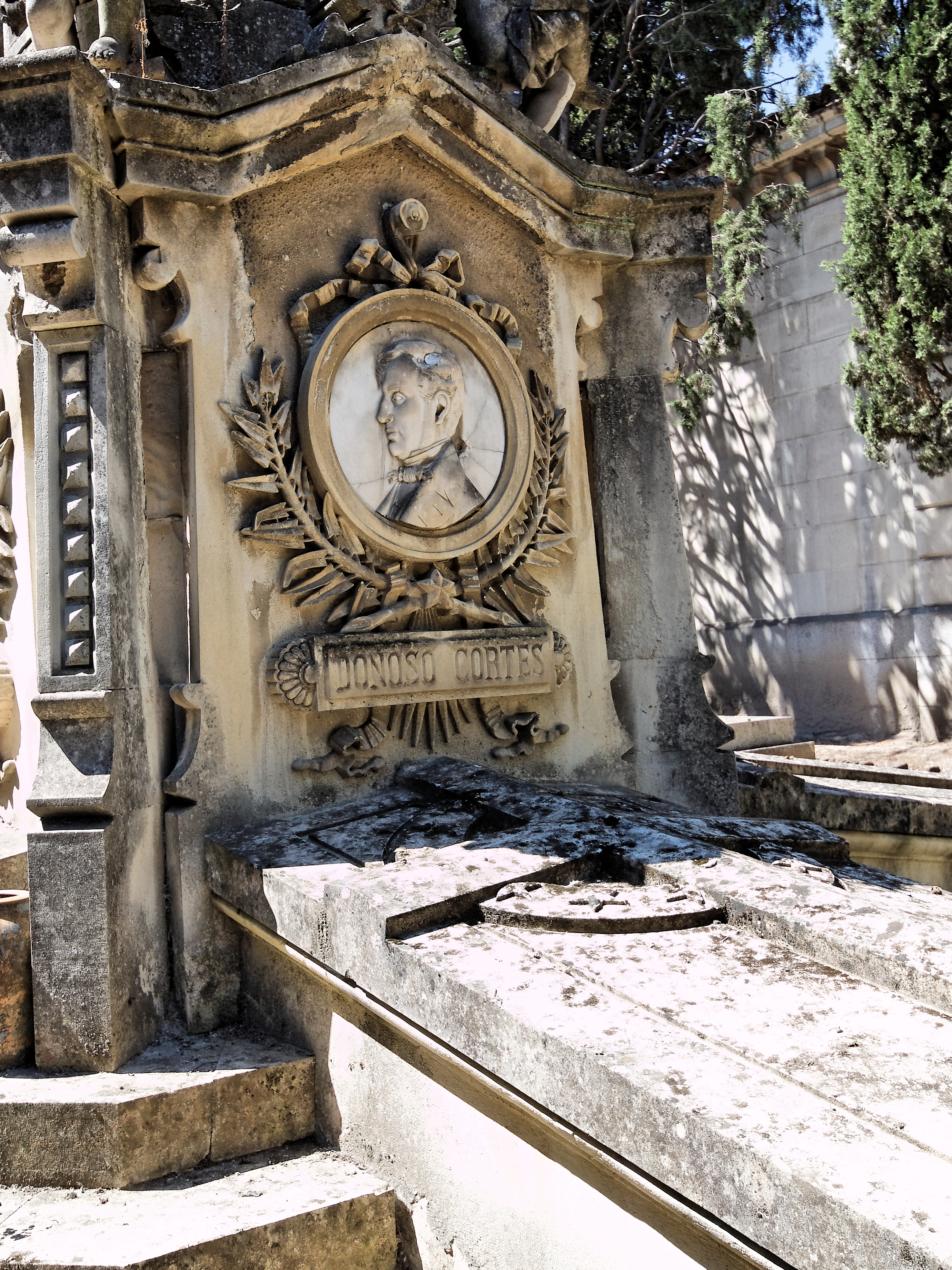 Cementerio de la Sacramental de San Isidro, Madrid. Tumba de Donoso Cortés, parte del monumento funerario de Goya, Meléndez Valdés, Donoso Cortés y Moratín. Obra del arquitecto Joaquín de la Concha Alcalde y del escultor Ricardo Bellver, realizada en piedra y mármol en 1887.